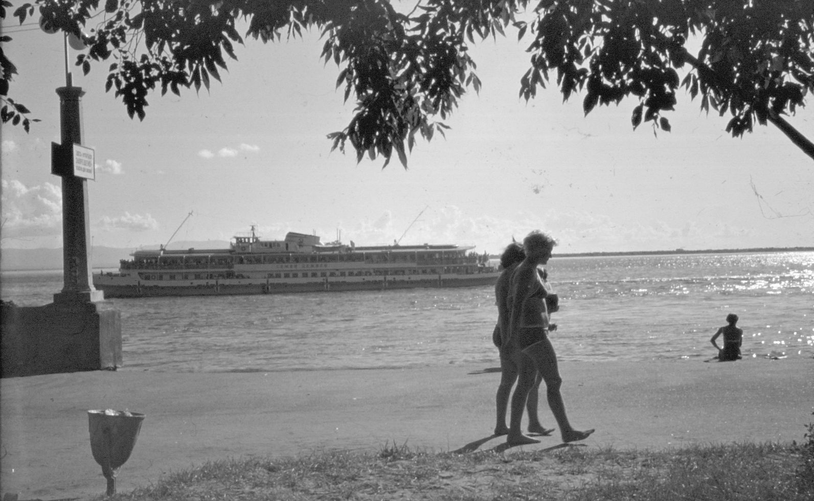 Хабаровск, теплоход "Семён Дежнёв" (проект 860), 1978 год. Фотография сделана на чёрно-белую обращаемую фотоплёнку ОЧ-45.